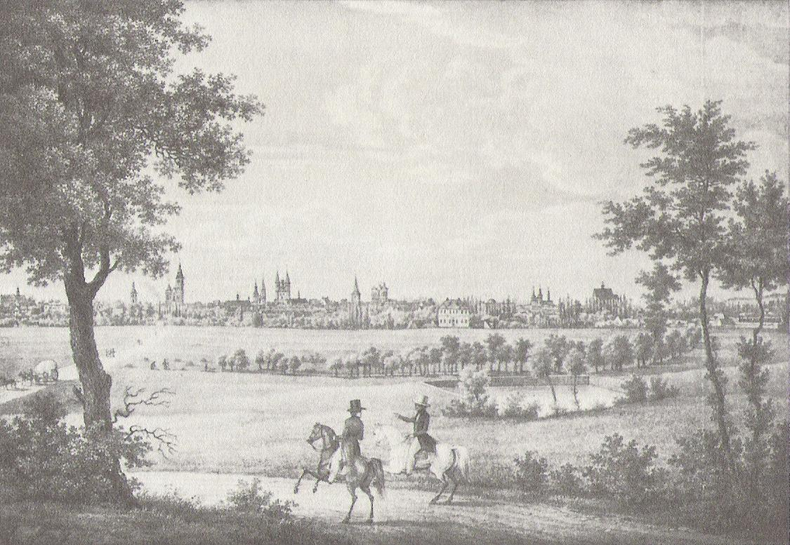 Blick auf den Jödebrunnen und Braunschweig von Südwesten um 1840.